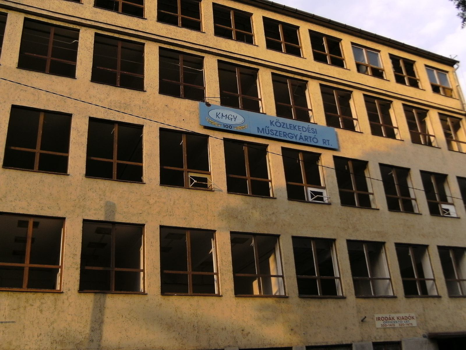 A Ganz Közlekedési Mérőműszerek Gyára bontás előtt, Budapest